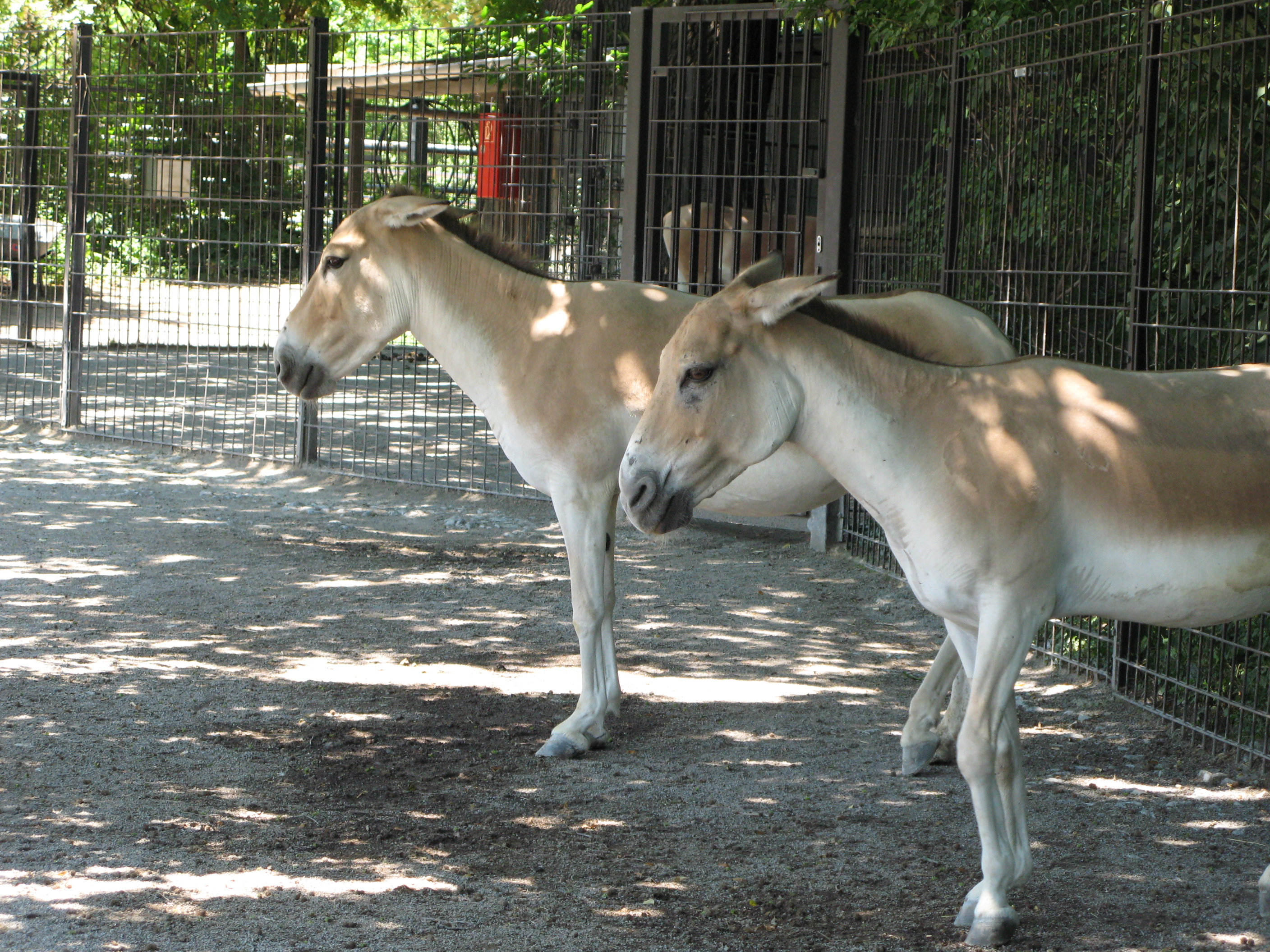 Equus hemionus - Asiatische Esel, aufgenommen im Stuttgarter Zoo Wilhelma